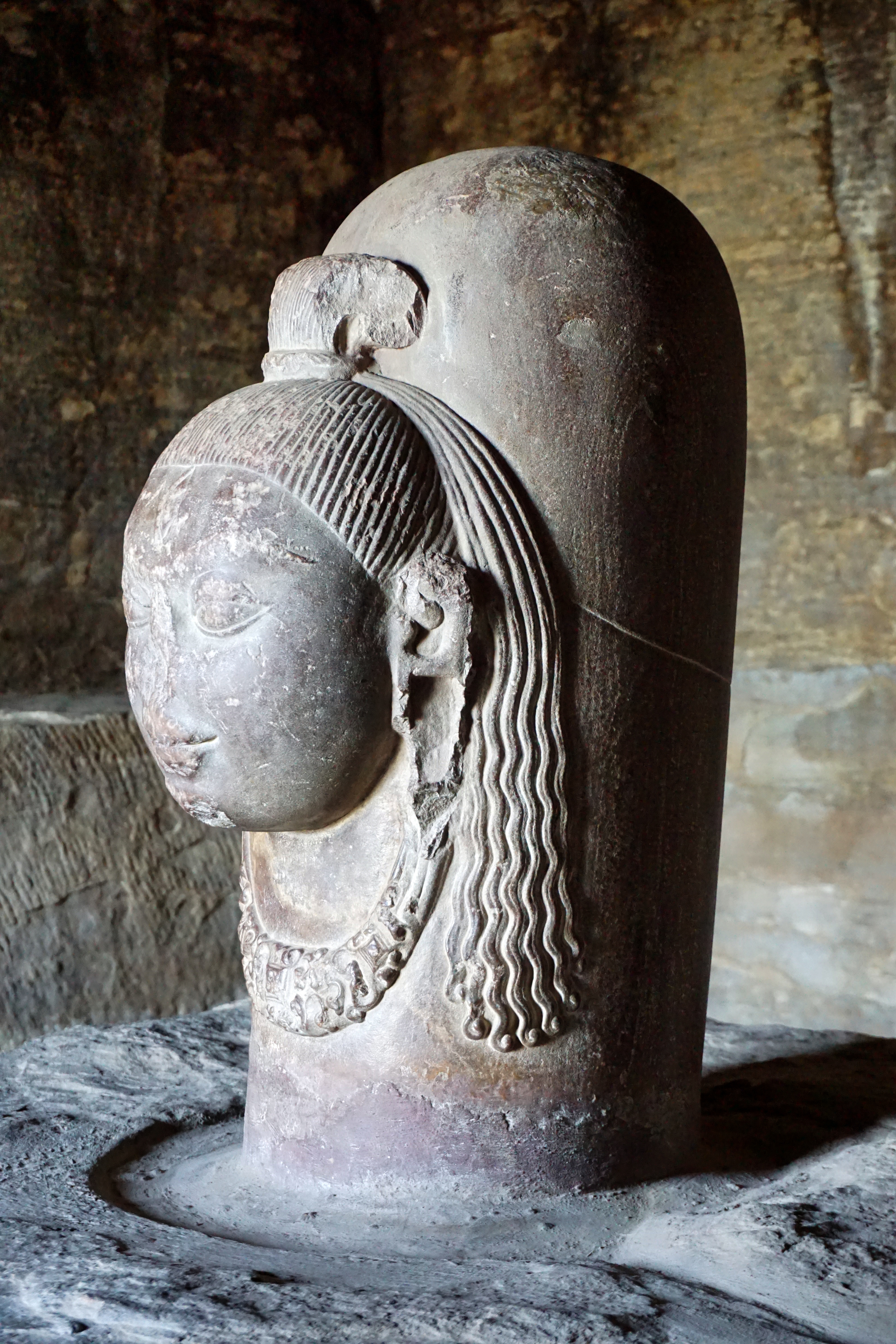 Udayagiri Caves, Vidisha, India